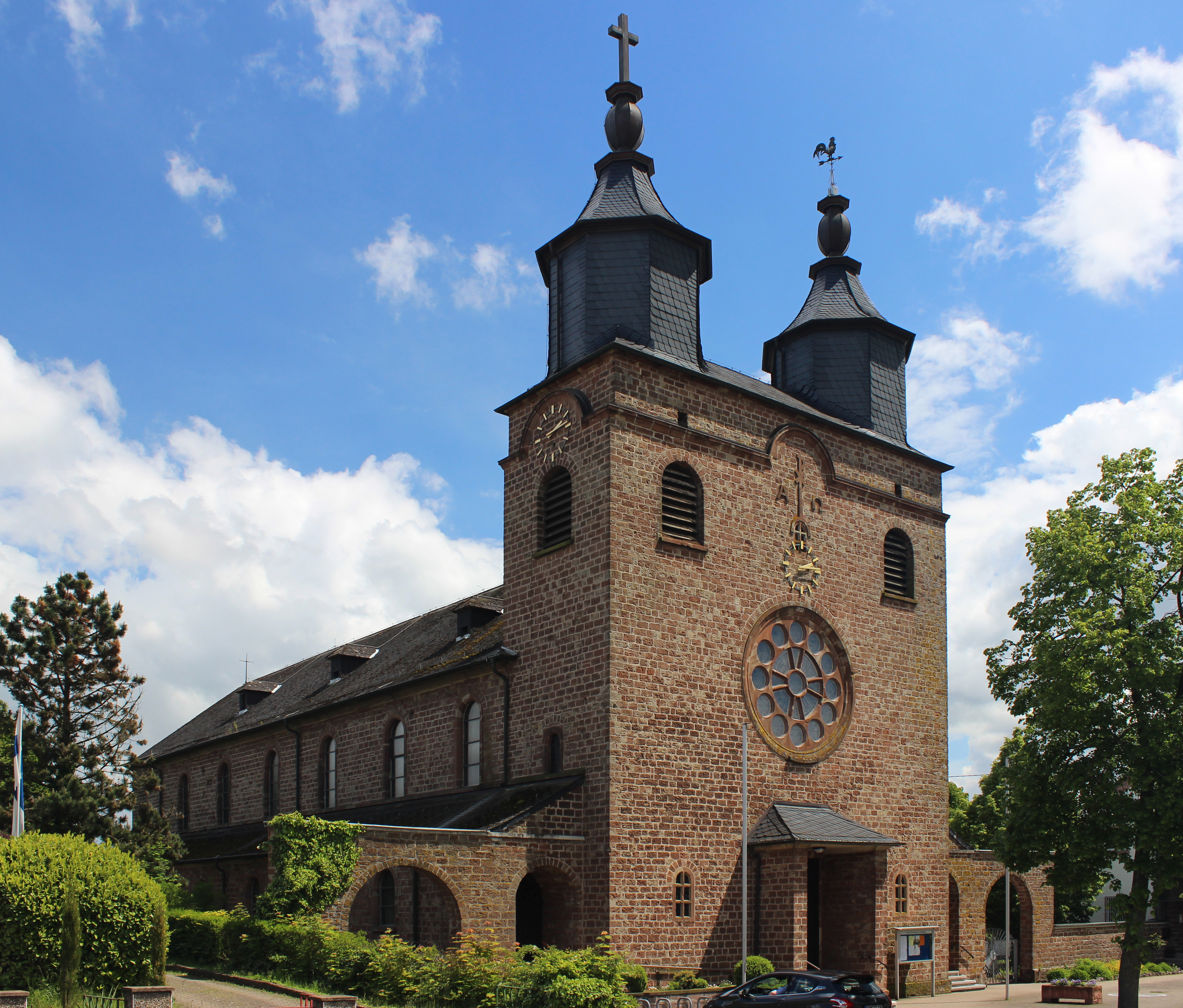 Die katholische Pfarrkirche St. Matthias in Altforweiler, einem Ortsteil der Gemeinde Überherrn, Landkreis Saarlouis, Saarland